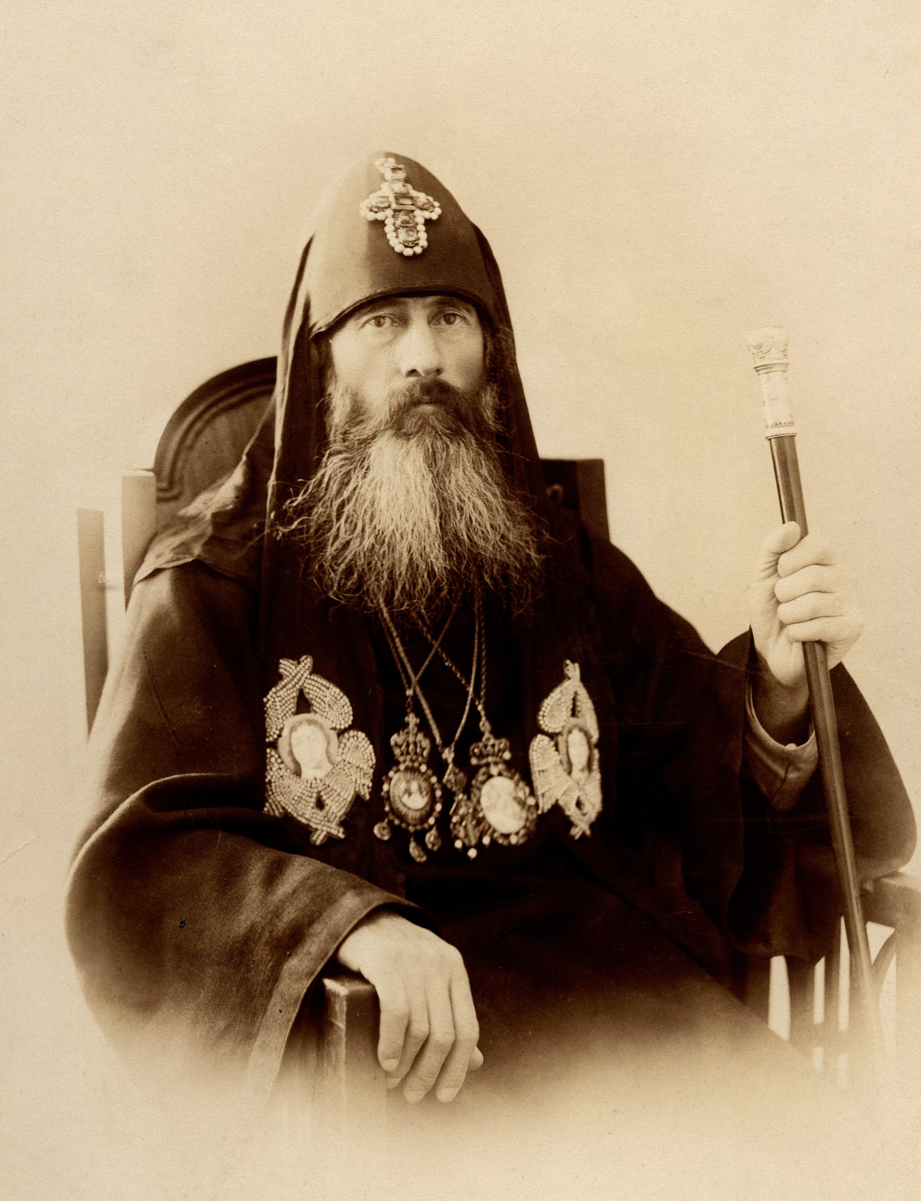 Каталикос Патриарх Христофор III